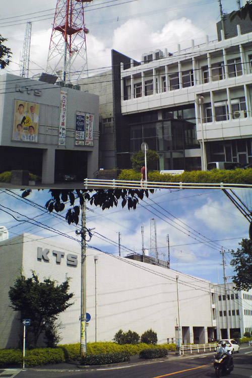 鹿児島テレビ放送